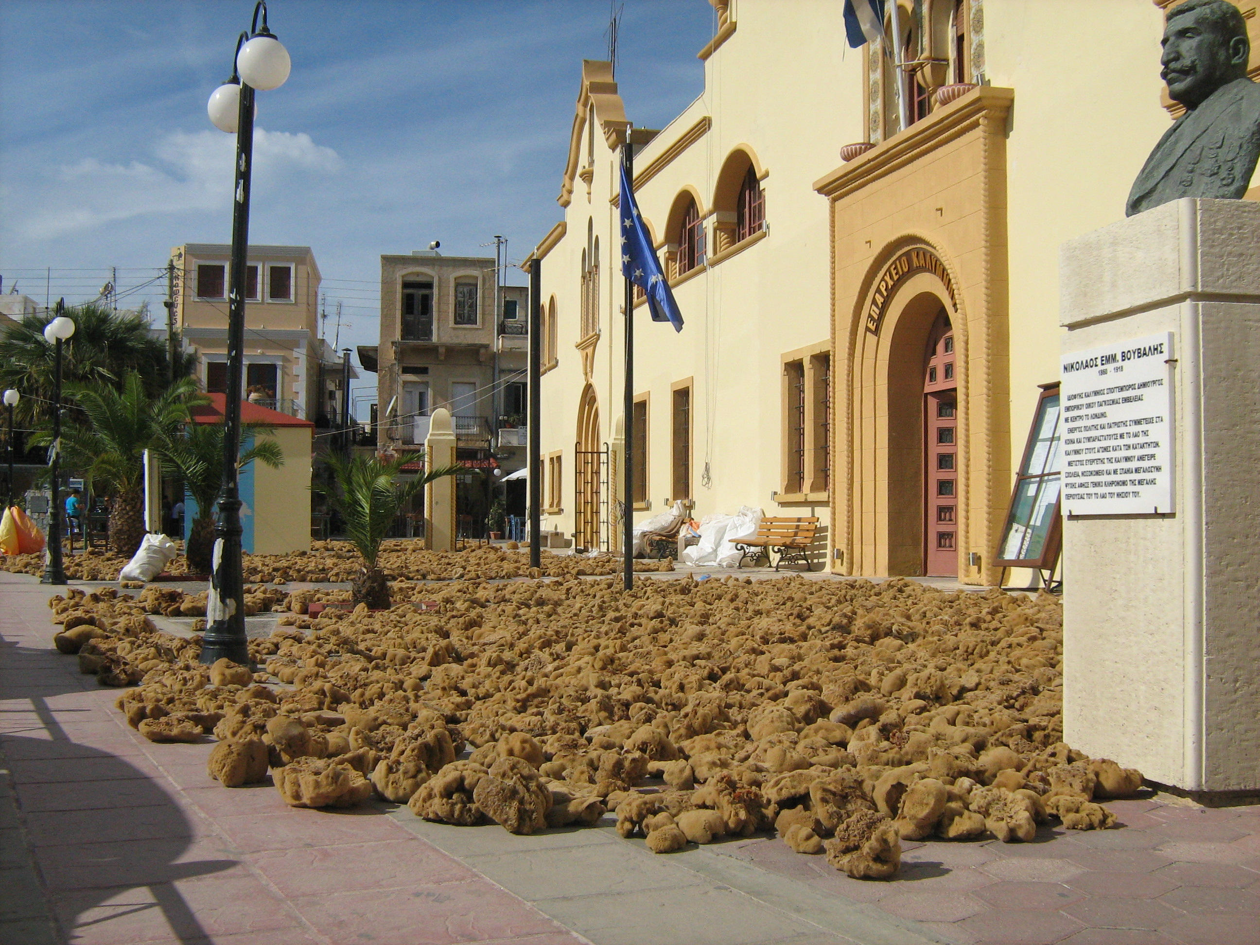 Σφουγγάρια που στεγνώνουν μπροστά από το Επαρχείο Καλύμνου